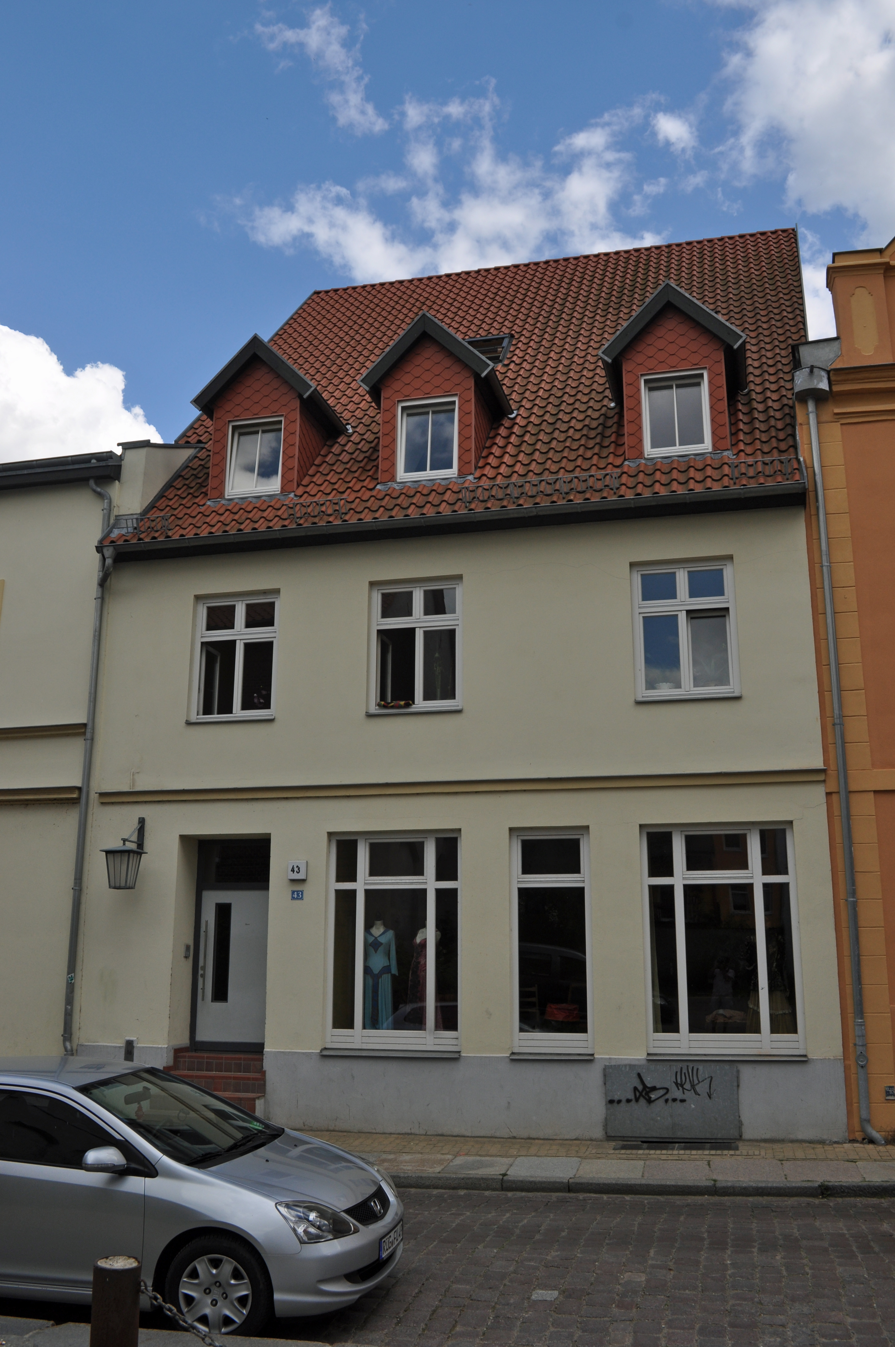 Das Foto zeigt ein Haus (bzw. Details des Hauses) in der Frankenstraße in Stralsund, Deutschland. Die Hausnummer steht im Dateinamen. Aufgenommen am 19. Juli 2011 vom Benutzer:Klugschnacker.